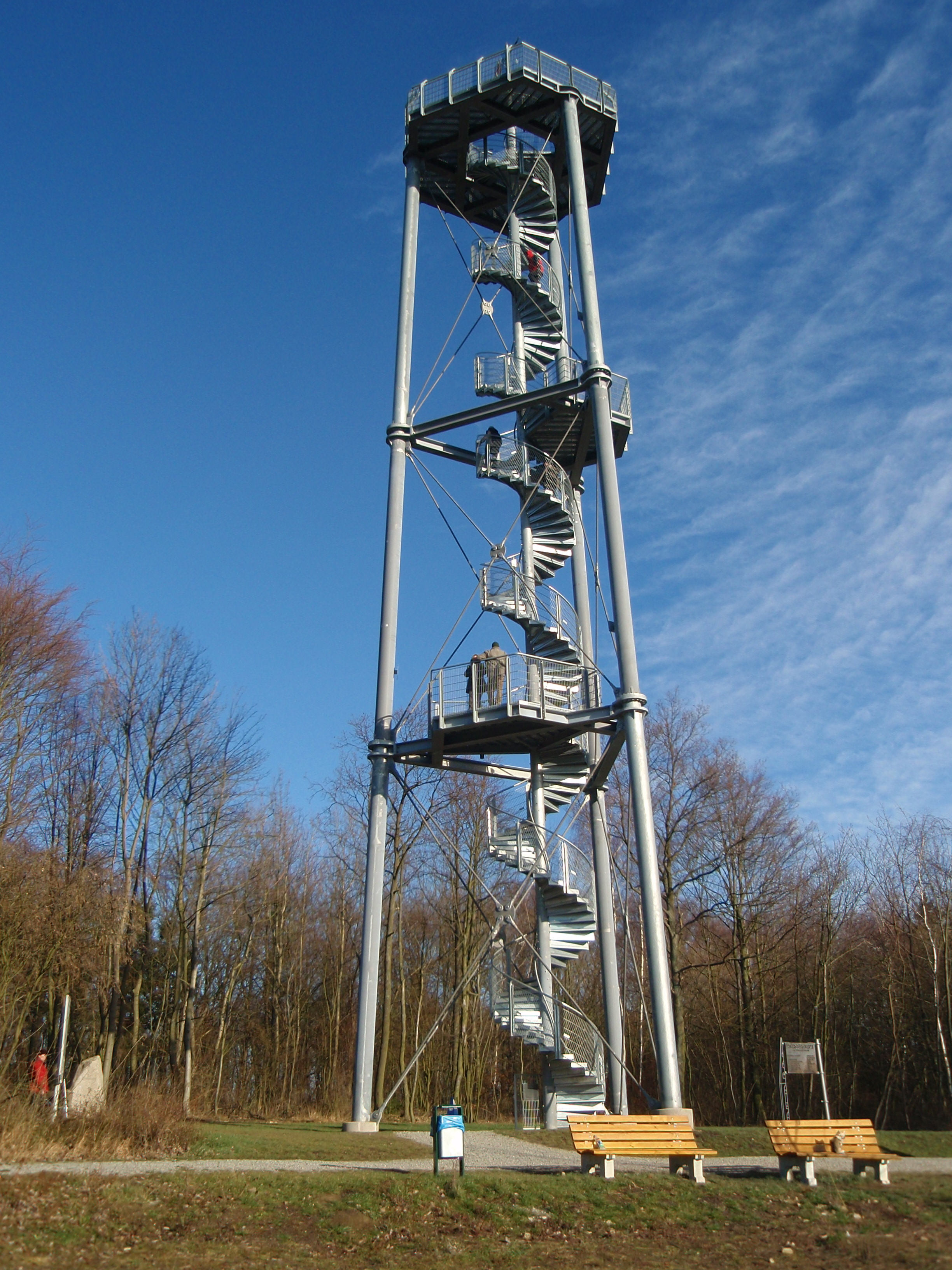 Bürgerturm bei Gotha